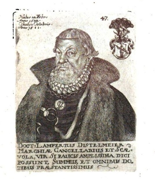 Bildnis Lampert Distelmeier (1522–1588)